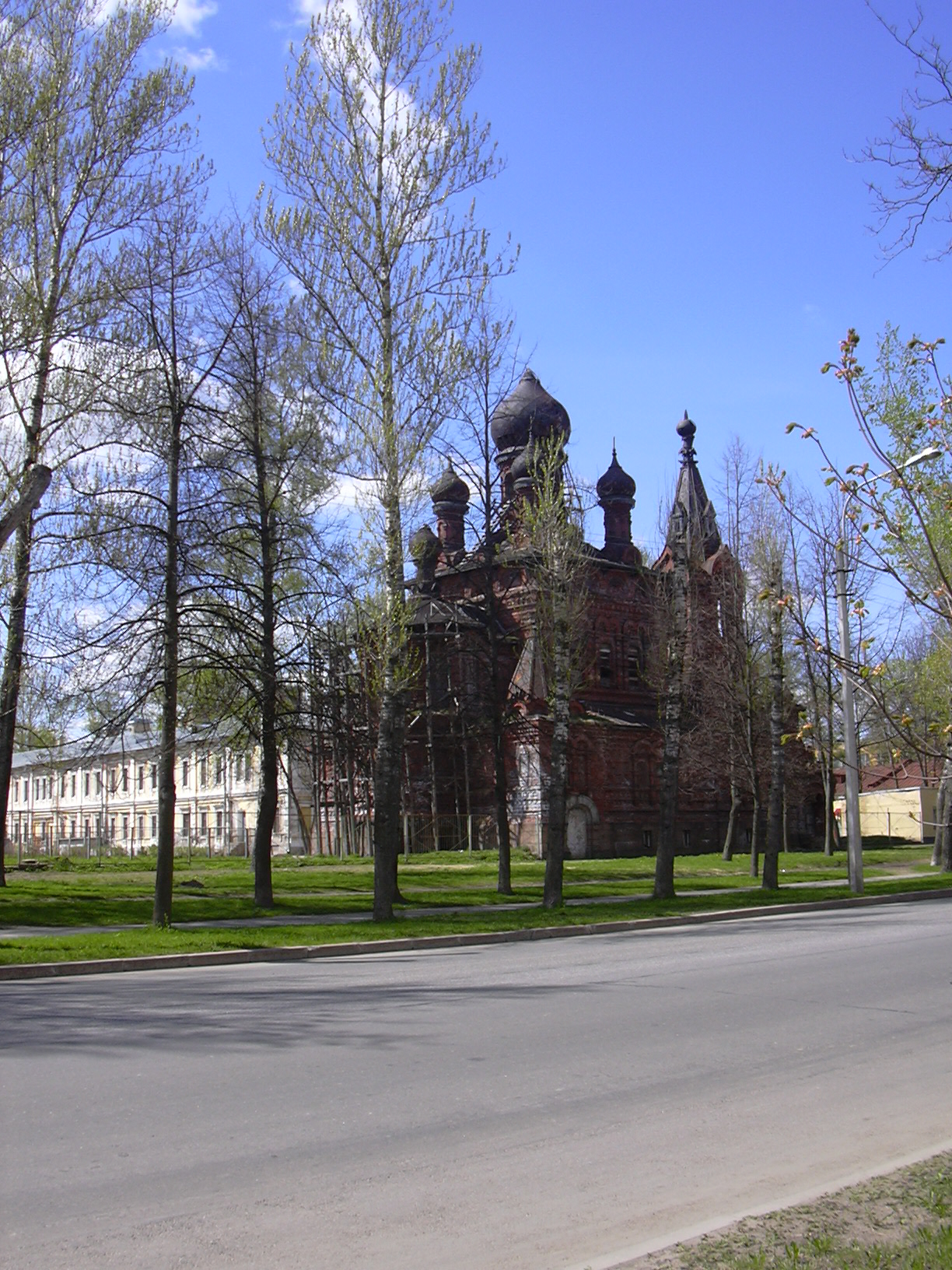 Кирасирская церковь (современный вид).